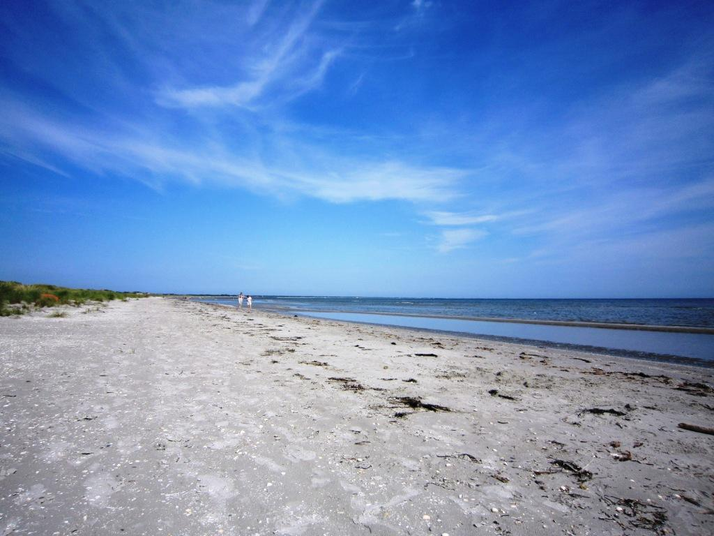 Napstjert strand i Frederikshavn kommune i Danmark.